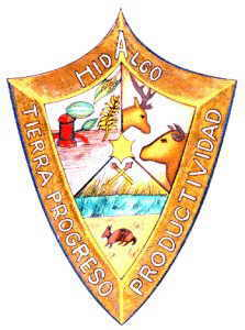 Escudo del municipio de Hidalgo, Coahuila